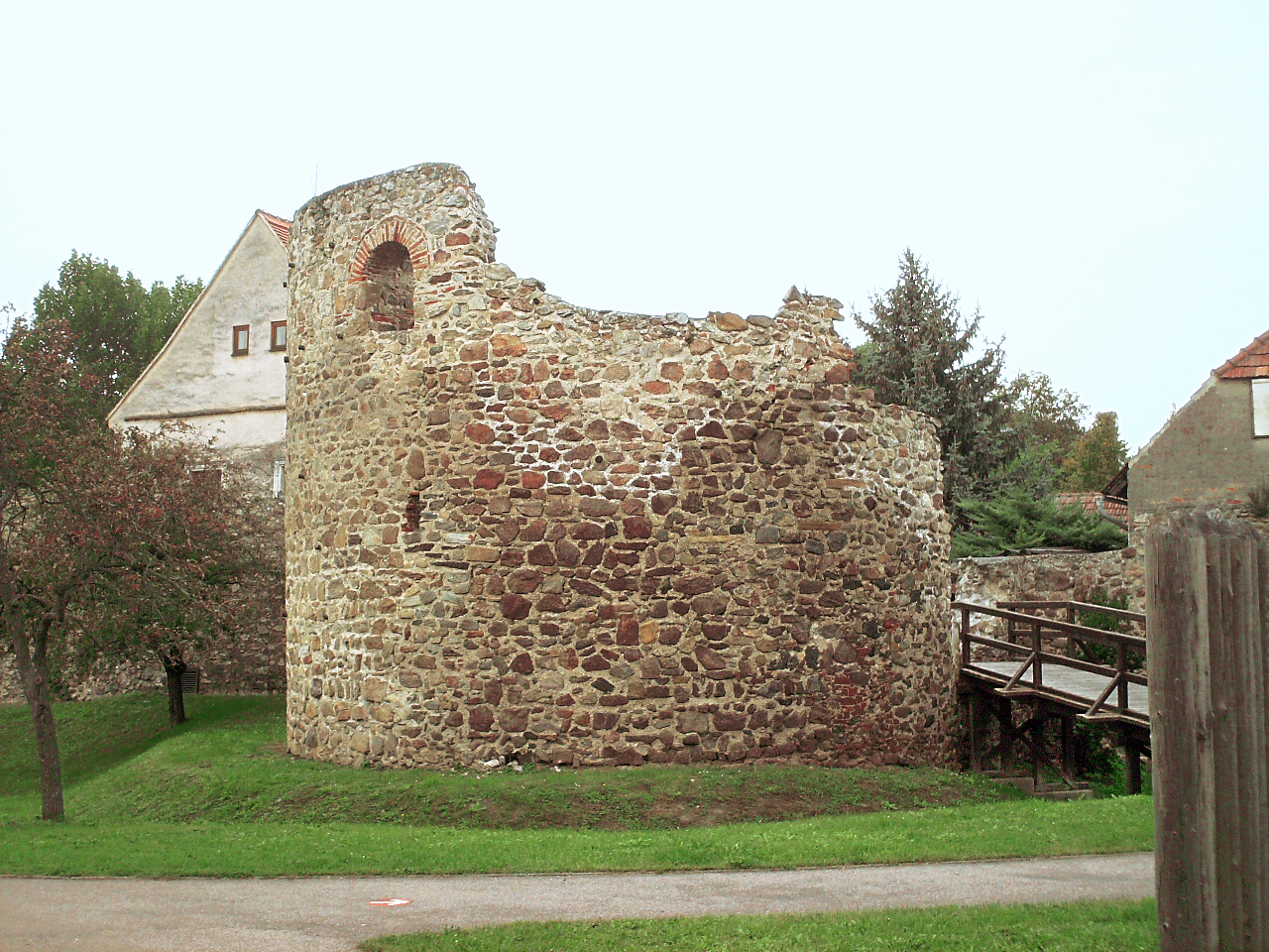 Mautern/D/NÖ, Ruine des westl U-Turmes, Blick aus Süd.